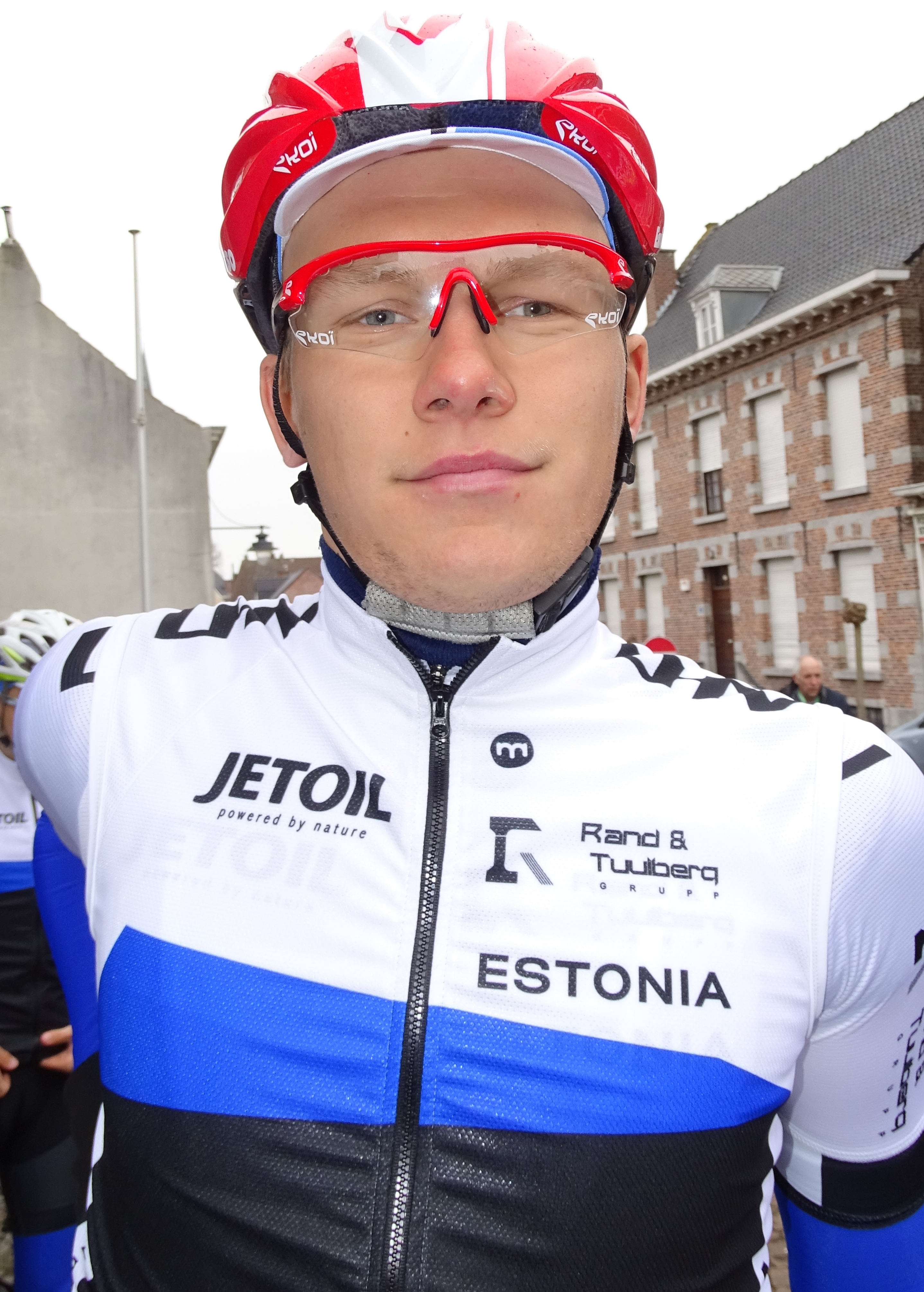 Triptyque des Monts et Châteaux 2015 Depicted person: Endrik Puntso Depicted team: Équipe nationale d'Estonie espoirs